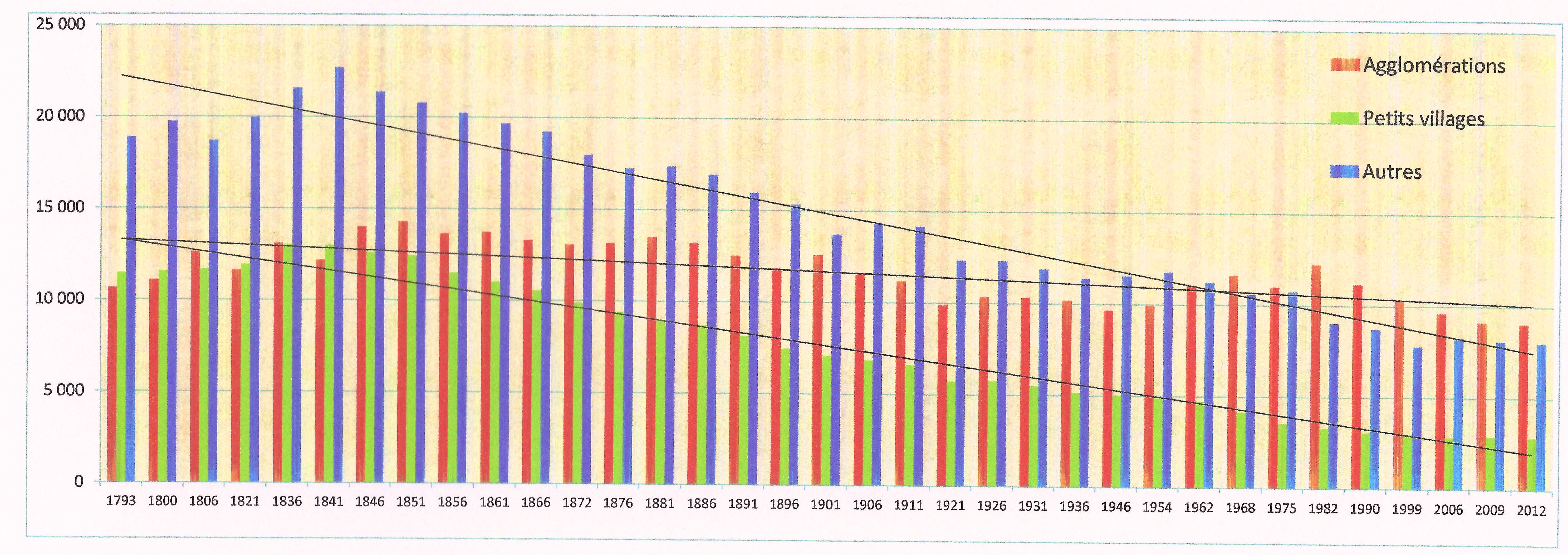 Evolution de la population de communauté de communes du Châtillonnais par catégories